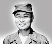 General Baik Seon-yub